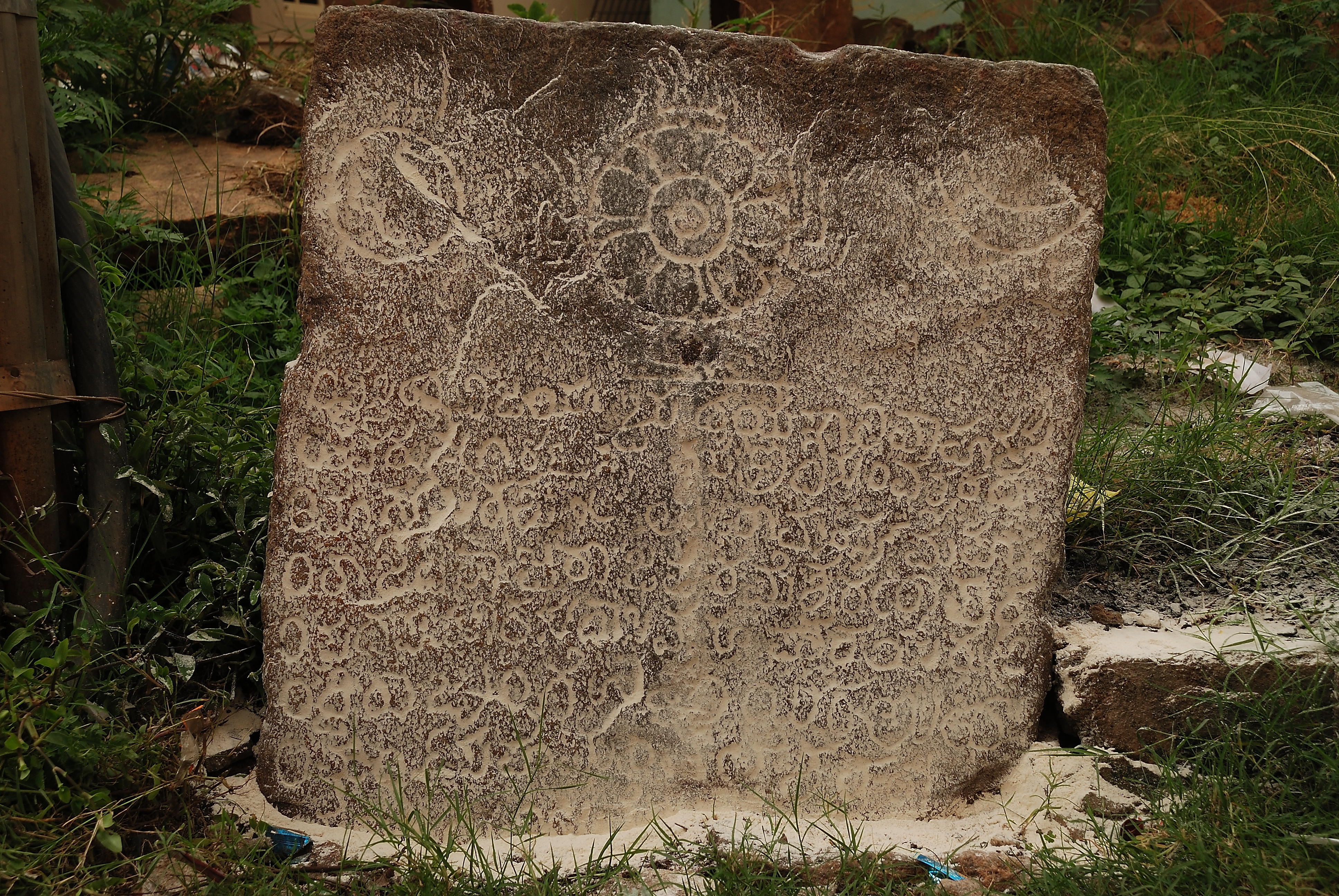 ಕನ್ನಡ: Allalasandra_FlourTrace